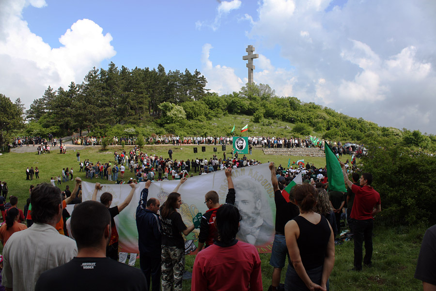 Втори юни.Преклонение пред делото да Христо Ботев на връх Околчица.